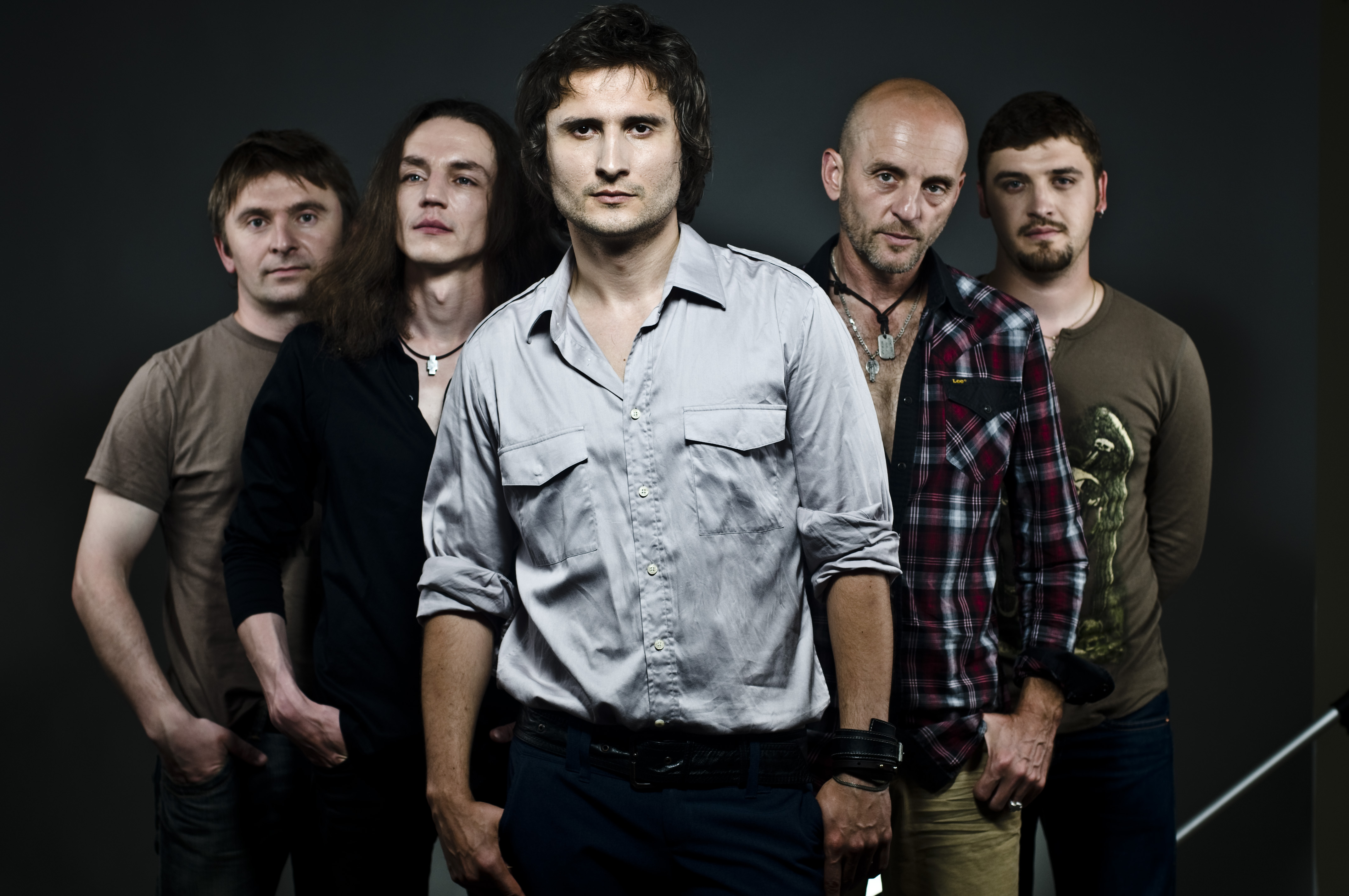 Віктор Винник і група "МЕРІ"